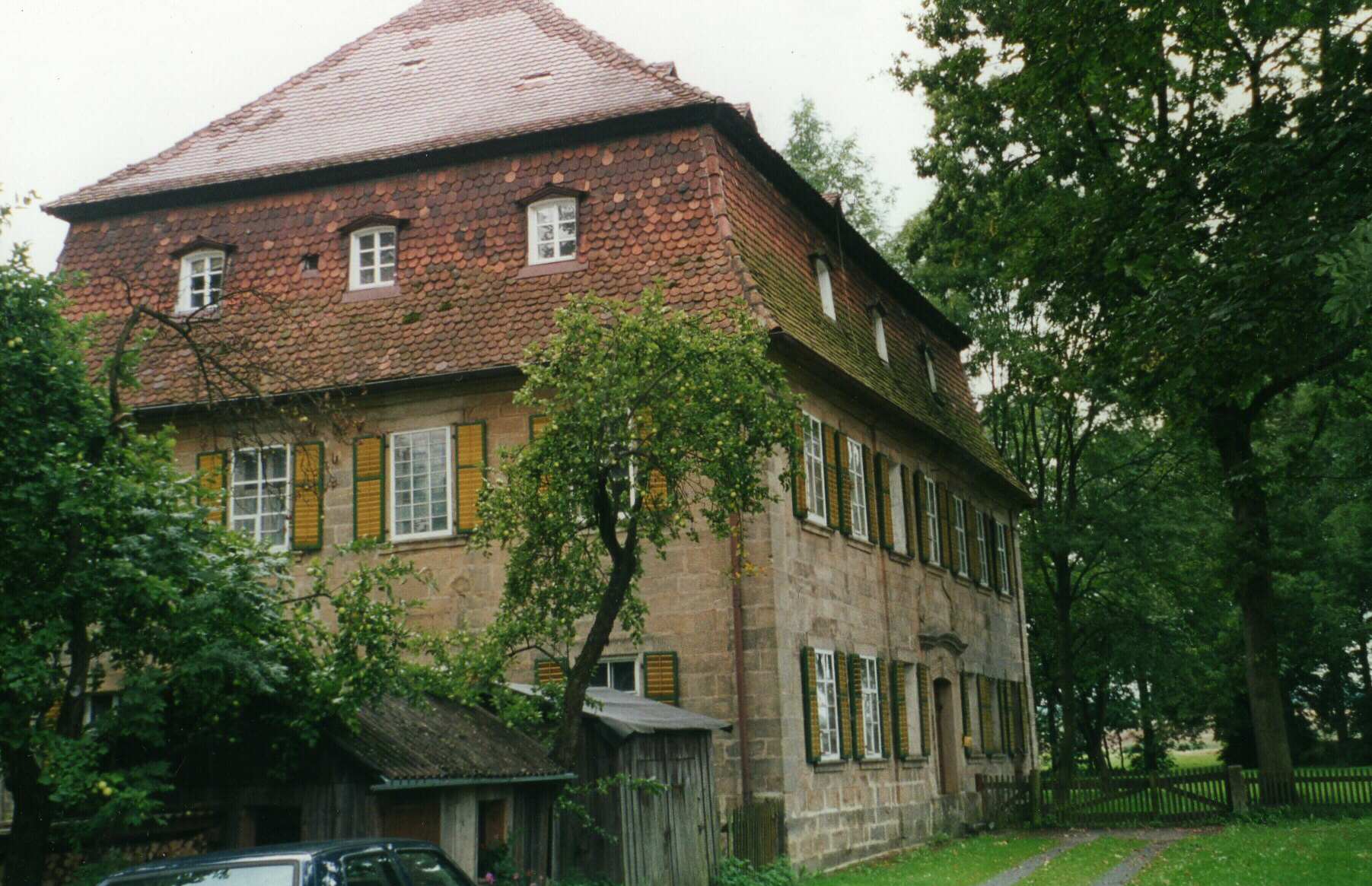 Ehemaliges Schloss Guttenthau, Denkmal Nr. D-4-72-190-5